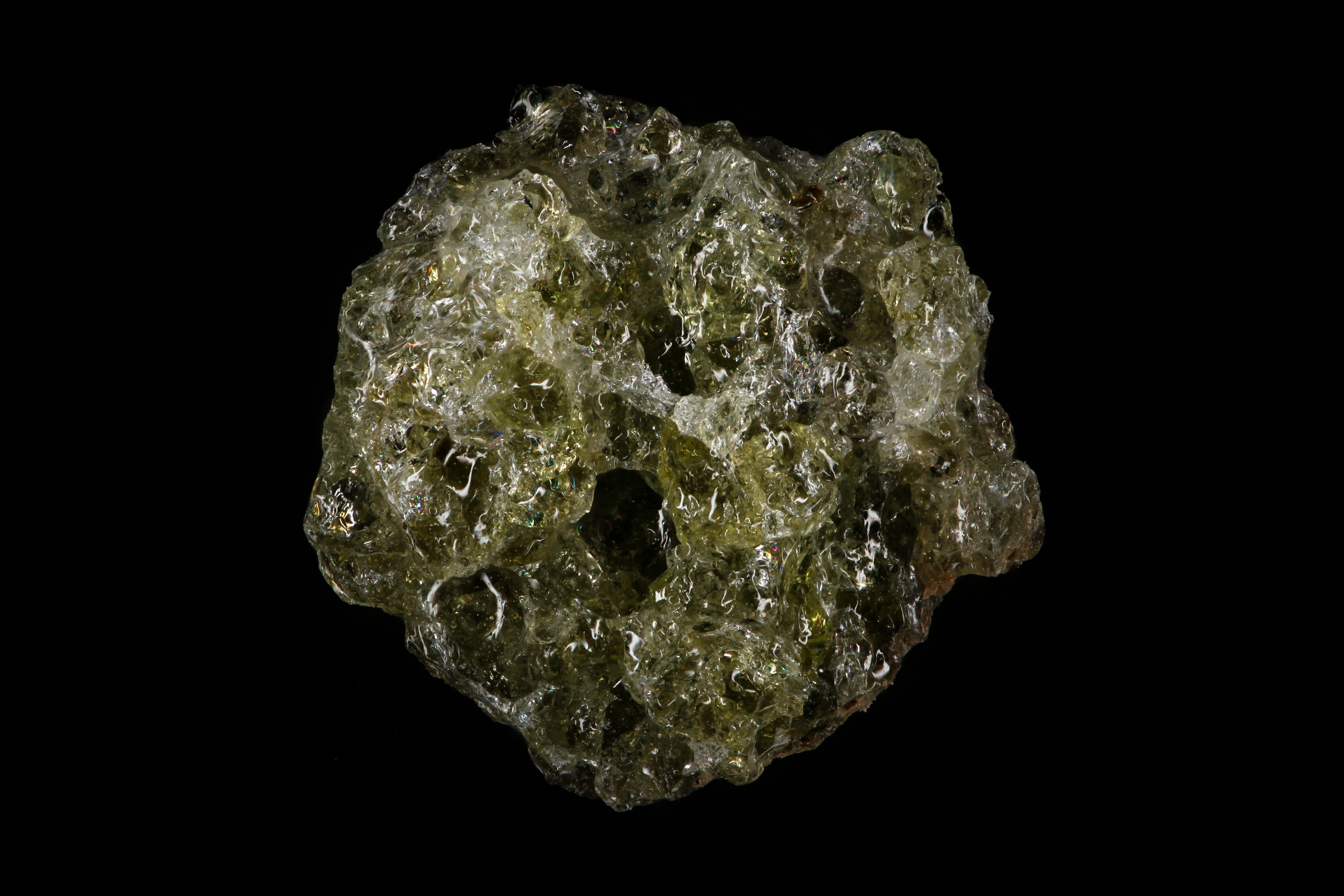 Trinitite, approx. 6 mm diameter